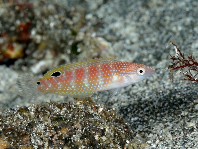 アデイトベラ Suezichthys arquatus